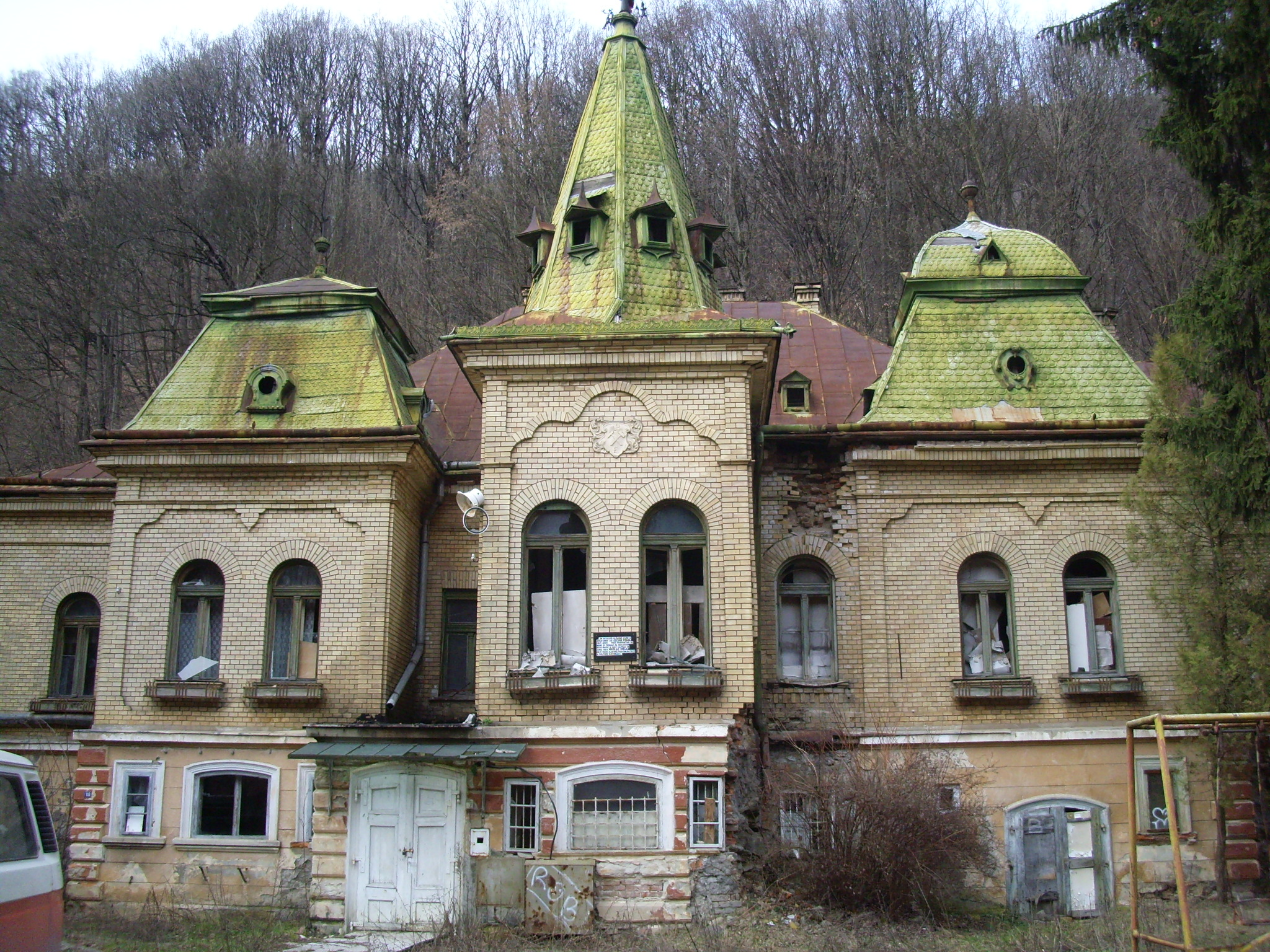 Pocol House, Valea Borcutului, Baia Mare, Romania